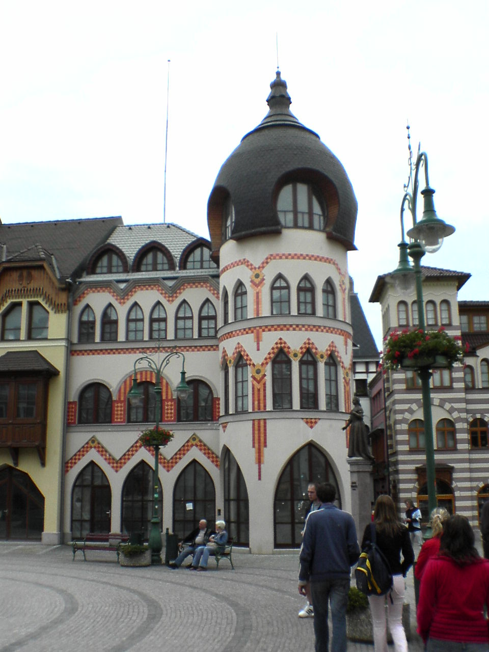 Nádvorie Európy (another view) in Komárno